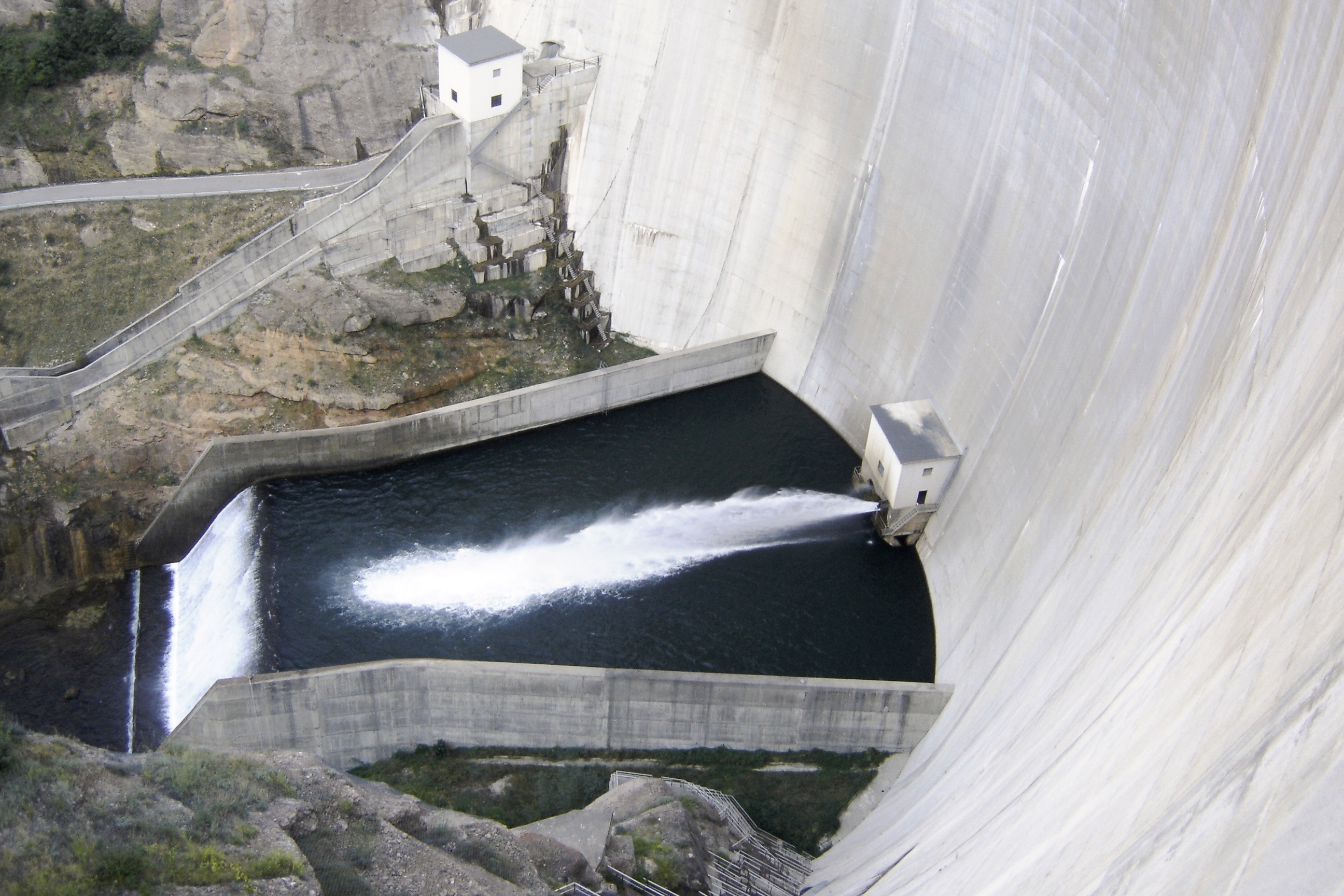 Presa de l'embassament de la Llosa del Cavall, a Navès (Solsonès).